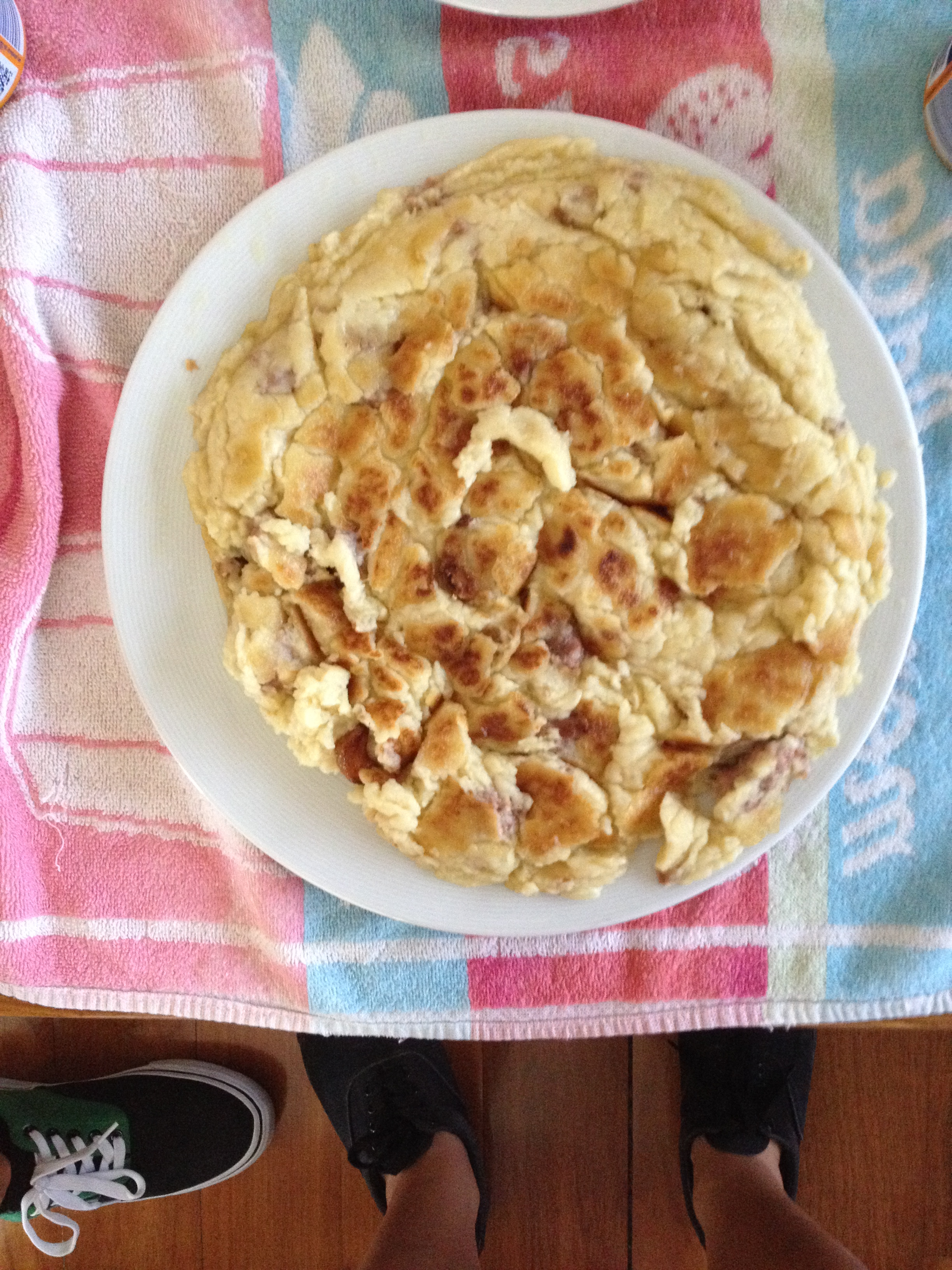 Una gachamiga, plato típico de la gastronomía en Elda.